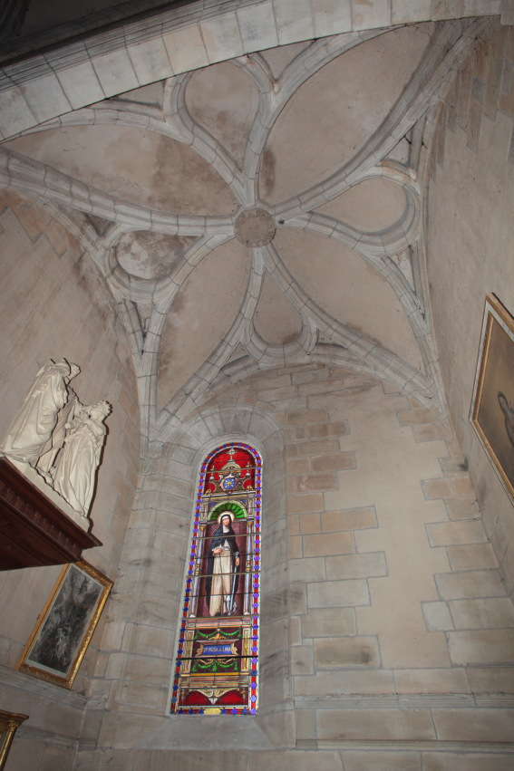 Kirche Saint-Pierre in Assier, Innenansicht